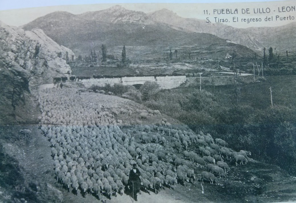 Paso ovejas merinas san Tirso Puebla de Lillo